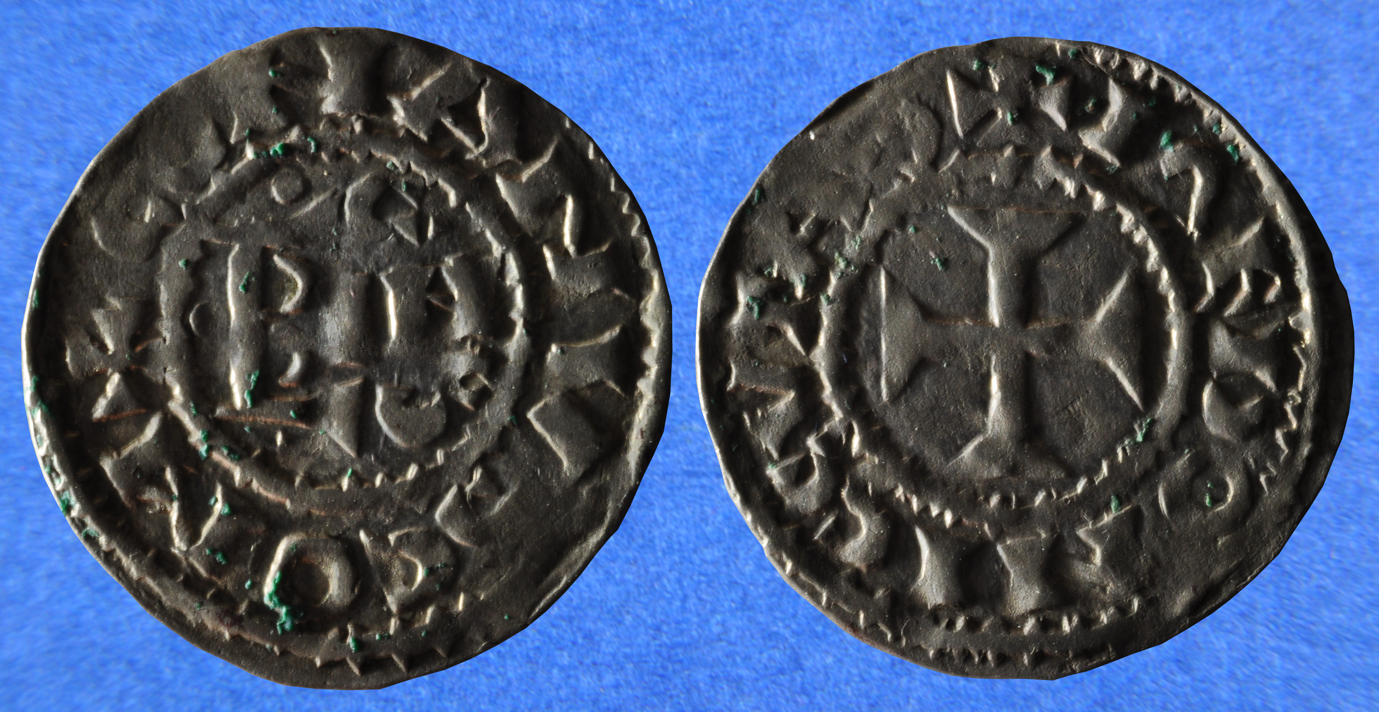 Une monnaie en argent d’un denier de Conan II, duc de Bretagne de 1040 à 1066. Conan est né à Rennes vers 1033 ou 1034. Son père Alain III est duc de 1008 à 1040. Conan est donc mineur à la mort de son père puisqu'il n’a que 6/7 ans. Son oncle Eudes 1er (ou Éon) de Penthièvre est son tuteur et c’est lui qui a le pouvoir. Il est l’adversaire de Guillaume le Bâtard, futur duc de Normandie. En 1047, après avoir perdu une bataille contre Guillaume, Eudes est obligé de confier le pouvoir à Conan qui devient duc officiellement en 1048. Conan meurt à Château-Gontier le 11 décembre 1066 alors qu’il assiège la ville, semble-t-il empoisonné par un traitre à la solde de Guillaume de Normandie. A/ +CONANUSCOM (Conan Comte) Point devant le monogramme de Conan, EB combinés devant IN; au-dessus C, derrière le C un point et un triangle, devant un triangle; au-dessous un s couché. R/ +REDONISCVTAS (Cité de Rennes) Croix pattée Dimension : 21,5 mm, flan irrégulier Poids : 1,24 g Axe des coins : 9h Références J8 ; B82/96-98 ; PA216/224 – 227-236 Remarques : Conan apparaît sur la tapisserie de Bayeux. Riwallon 1er de Dol de Bretagne, vassal du duc, se révolte contre lui. Conan met le siège devant Dol en 1064 mais Riwallon fait appel à Guillaume, duc de Normandie, qui vient à son secours. Conan lève le siège et se réfugie à Rennes poursuivi par Guillaume. Sur la tapisserie, on voit Conan s’enfuir d’un château (Dol ?) en descendant du donjon avec une corde. D’après la tapisserie, il part ensuite pour Dinan qui est assiégée par Guillaume. On voit Conan rendre les clés de la ville. Comme Guillaume est coupé de ses arrières sans ravitaillement, il rentre en Normandie. D’après Pierre le Baud, Conan finit par prendre Dol et à contraindre Riwallon à l’exil. Donc l’expédition de Guillaume renforce le pouvoir de Conan qui est soutenu par ses vassaux et qui finit par vaincre Riwallon.